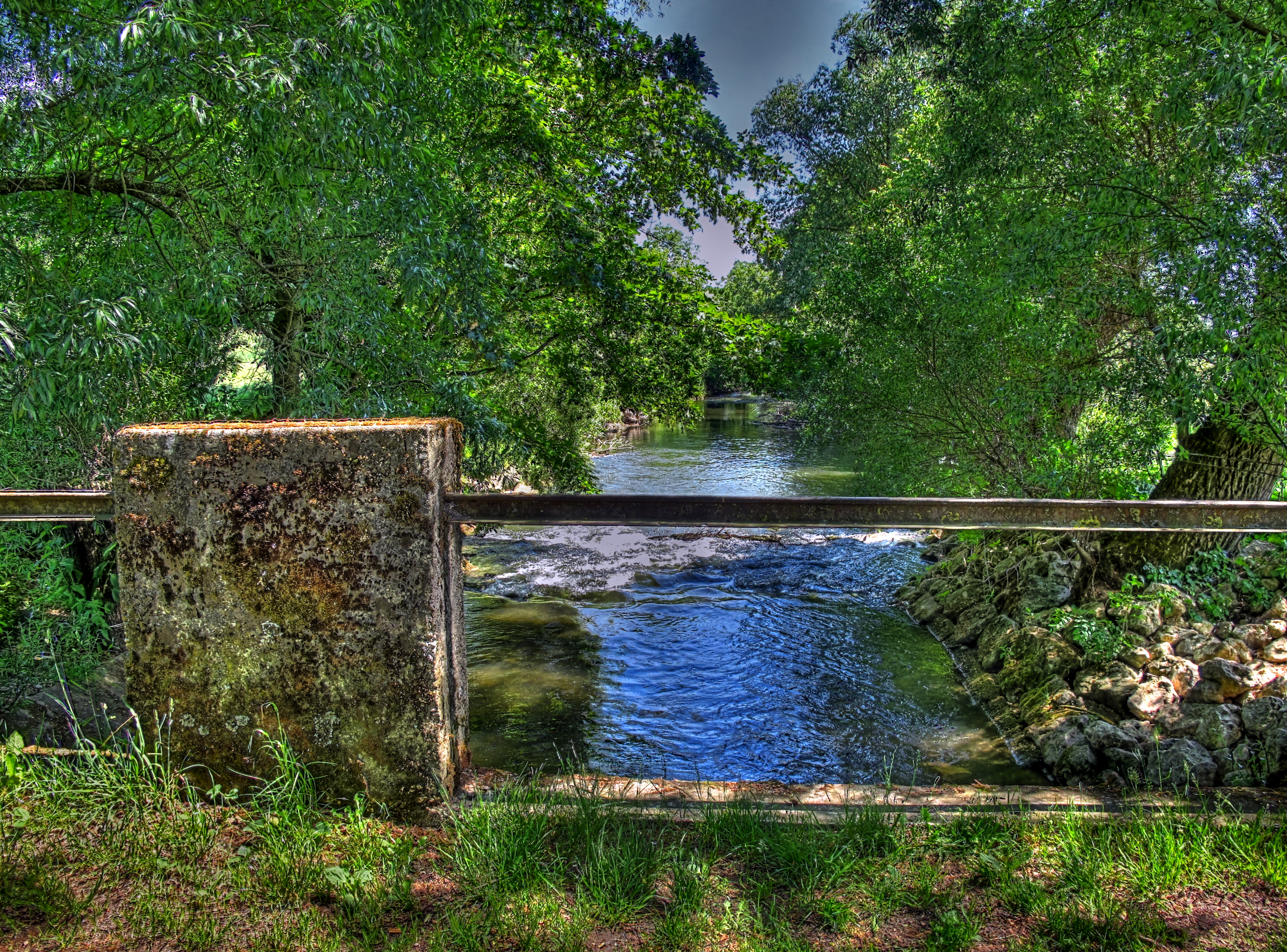 Deutschland, Bayern, Landkreis Dachau, Bergkirchen, Brücke über die Maisach